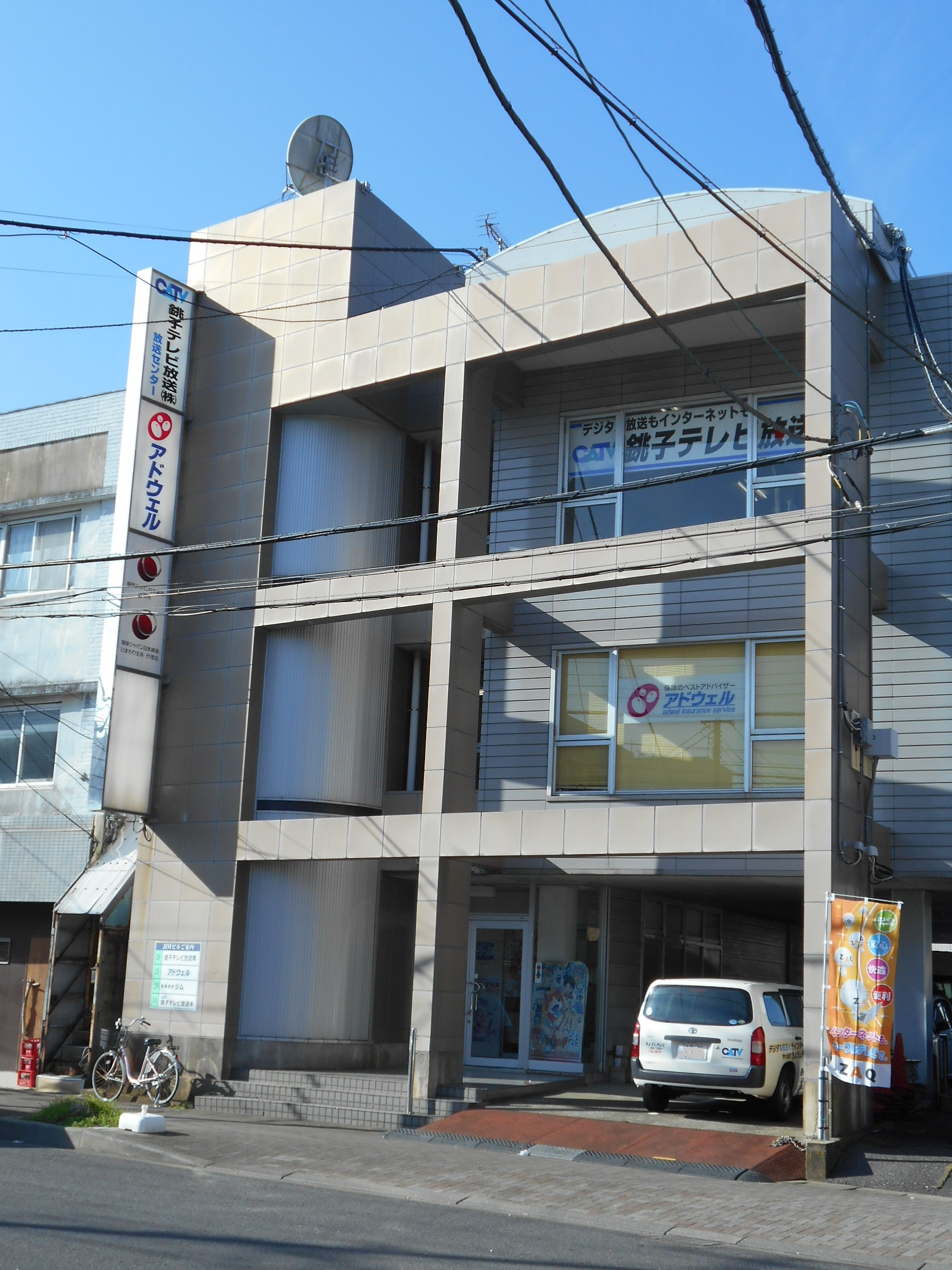 銚子テレビ放送